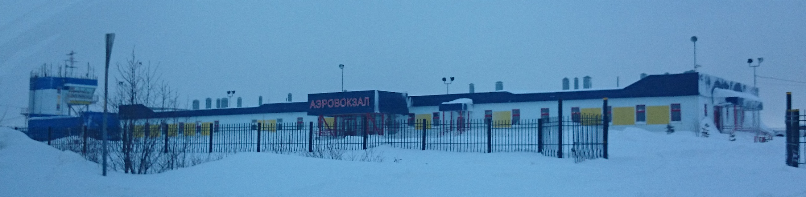 Nogliki Airport